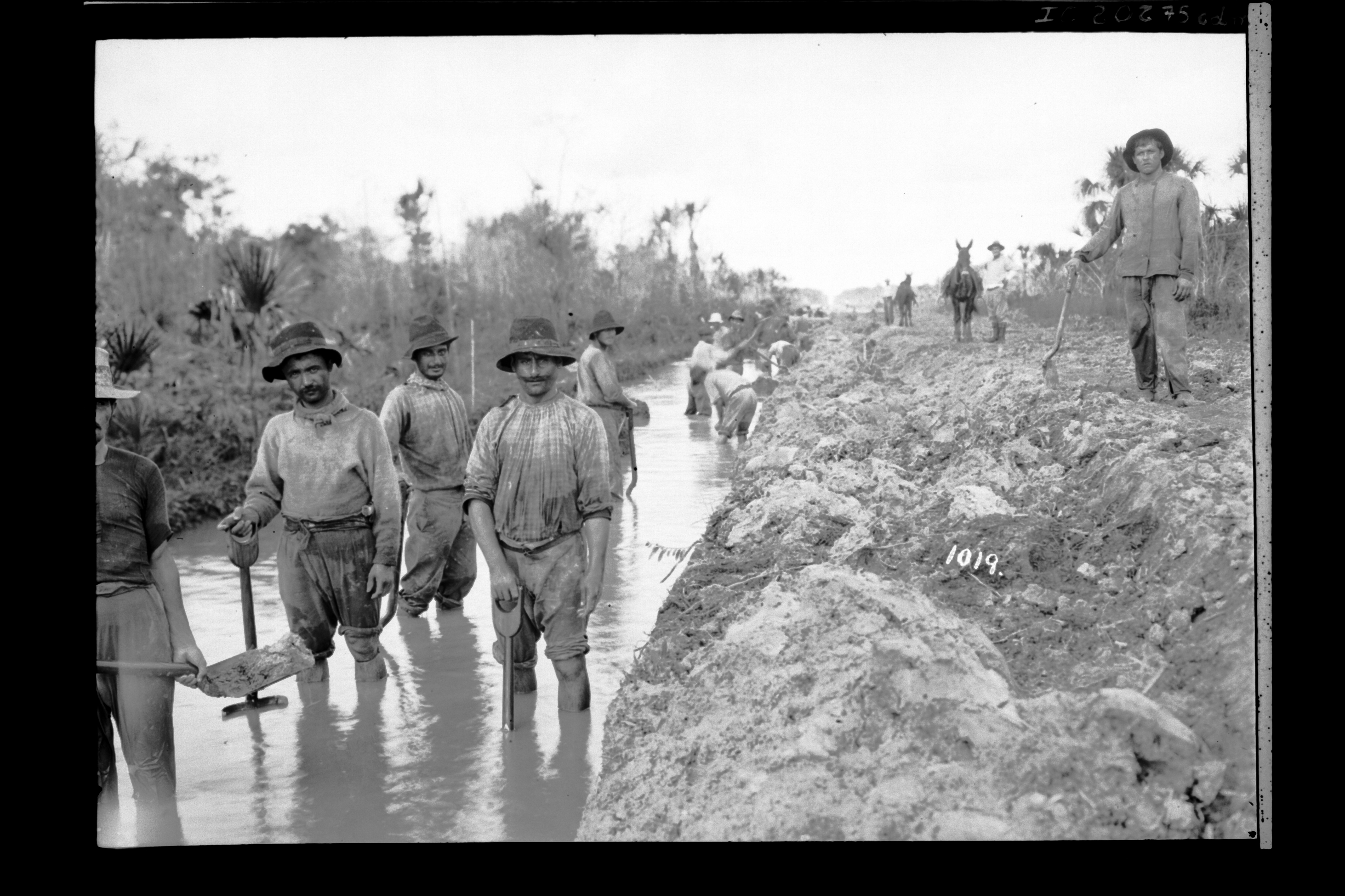 Obra que integra o acervo do Museu Paulista da USP. Coleção Dana Merrill.